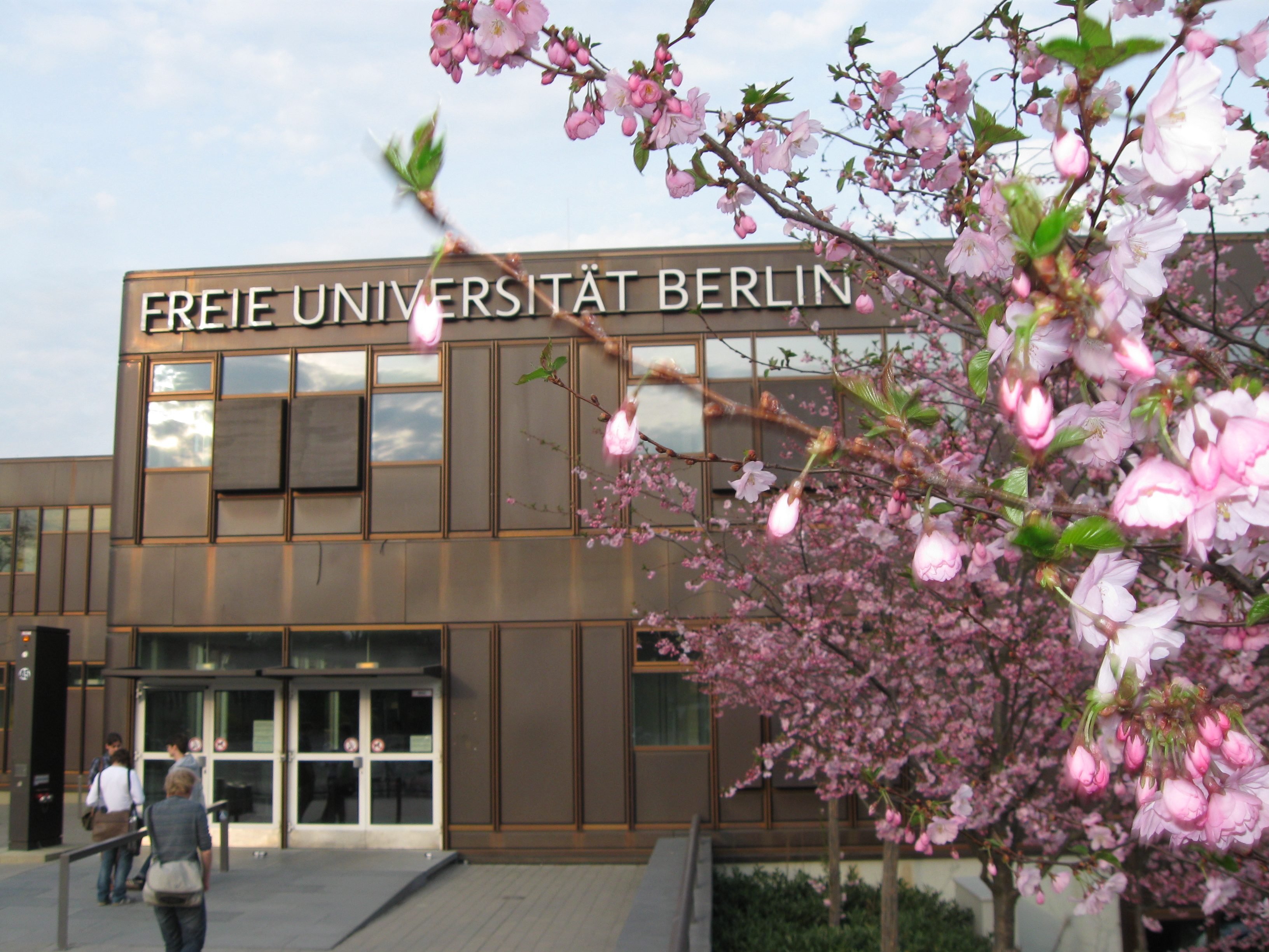 Die FU Berlin (2011)